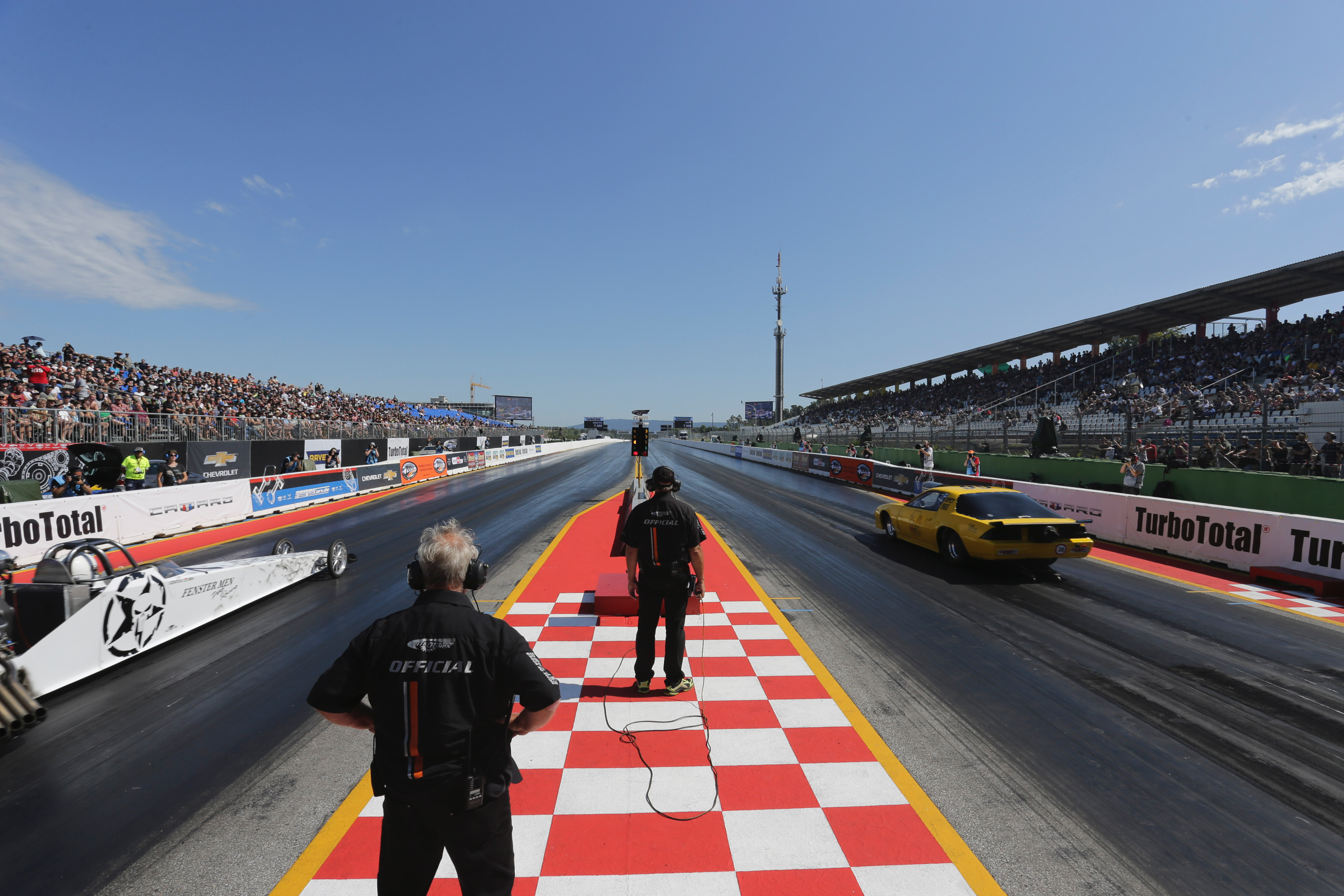 NitrOlympX 2019: Strecke und Ampel, startende Competition Dragster